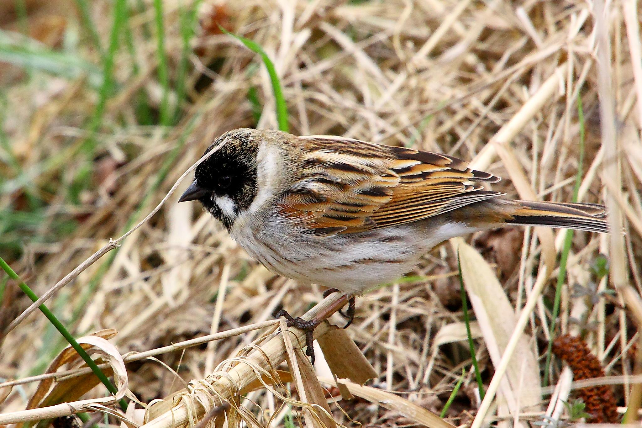 Reed Bunting - Lakenheath Fens